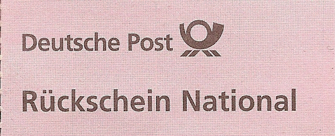 "Rückschein National" für Postsendungen der Deutschen Post AG mit der Versandform "Einschreiben mir Rückschein National" (diese an den Brief angeheftete Postkarte erhält der Empfänger nach Zustellung ausgefüllt ohne weiteres Porto)